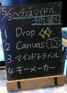 amiinaセトリボード(20150503(1))